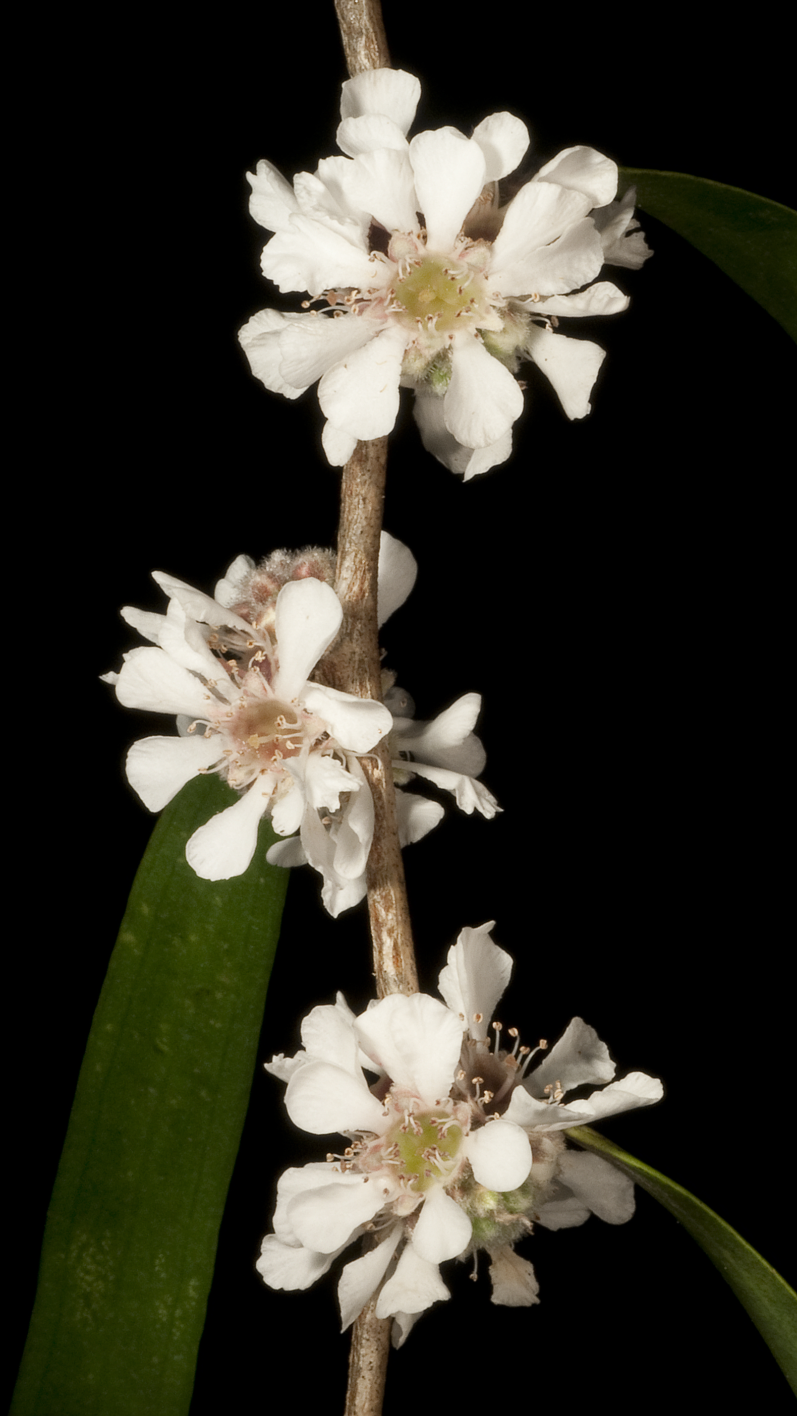 KRT4380